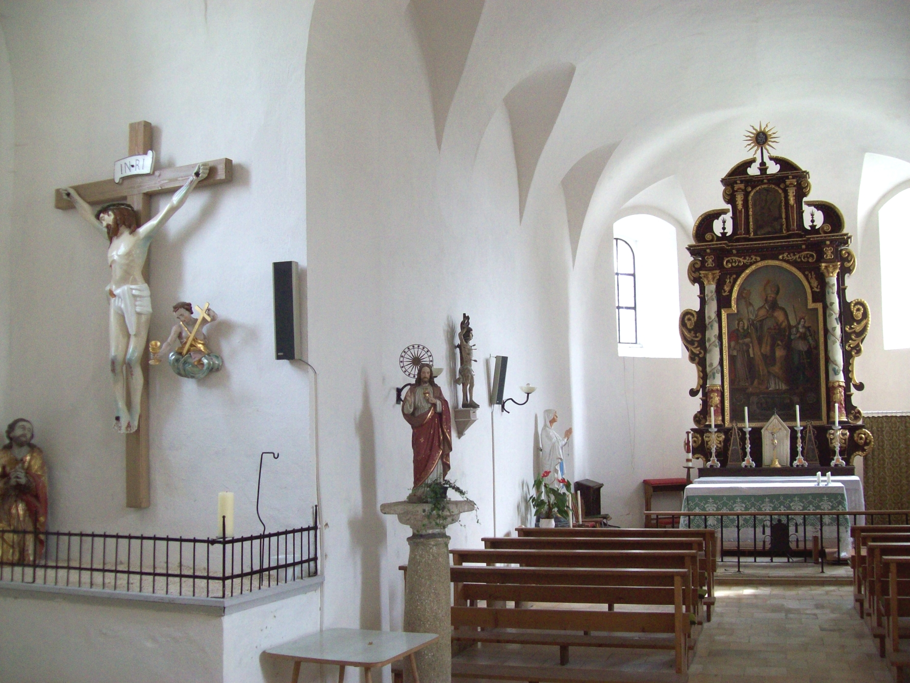 Nikolauskirche Grainet, erbaut um 1500 -Innenansicht